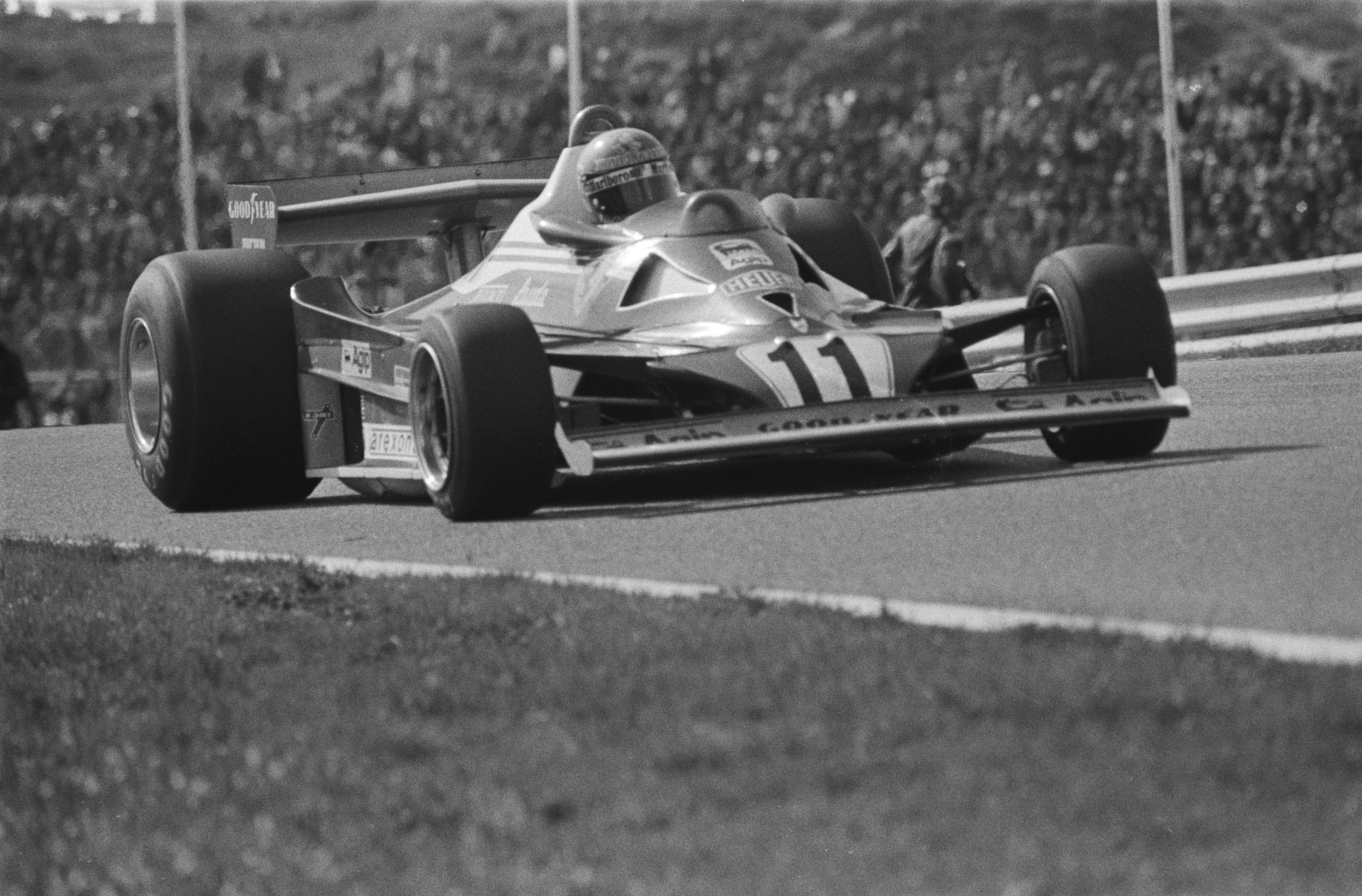 Collectie / Archief : Fotocollectie Anefo Reportage / Serie : [ onbekend ] Beschrijving : Grand Prix Zandvoort; Niki Lauda in actie Datum : 28 augustus 1977 Locatie : Noord-Holland, Zandvoort Trefwoorden : autoraces Persoonsnaam : Lauda, Niki Fotograaf : Suyk, Koen / Anefo Auteursrechthebbende : Nationaal Archief Materiaalsoort : Negatief (zwart/wit) Nummer archiefinventaris : bekijk toegang 2.24.01.05 Bestanddeelnummer : 929-3241